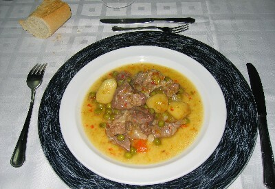 Carne gobernada al estilo de Oviedo para la Feria de la Ascensión